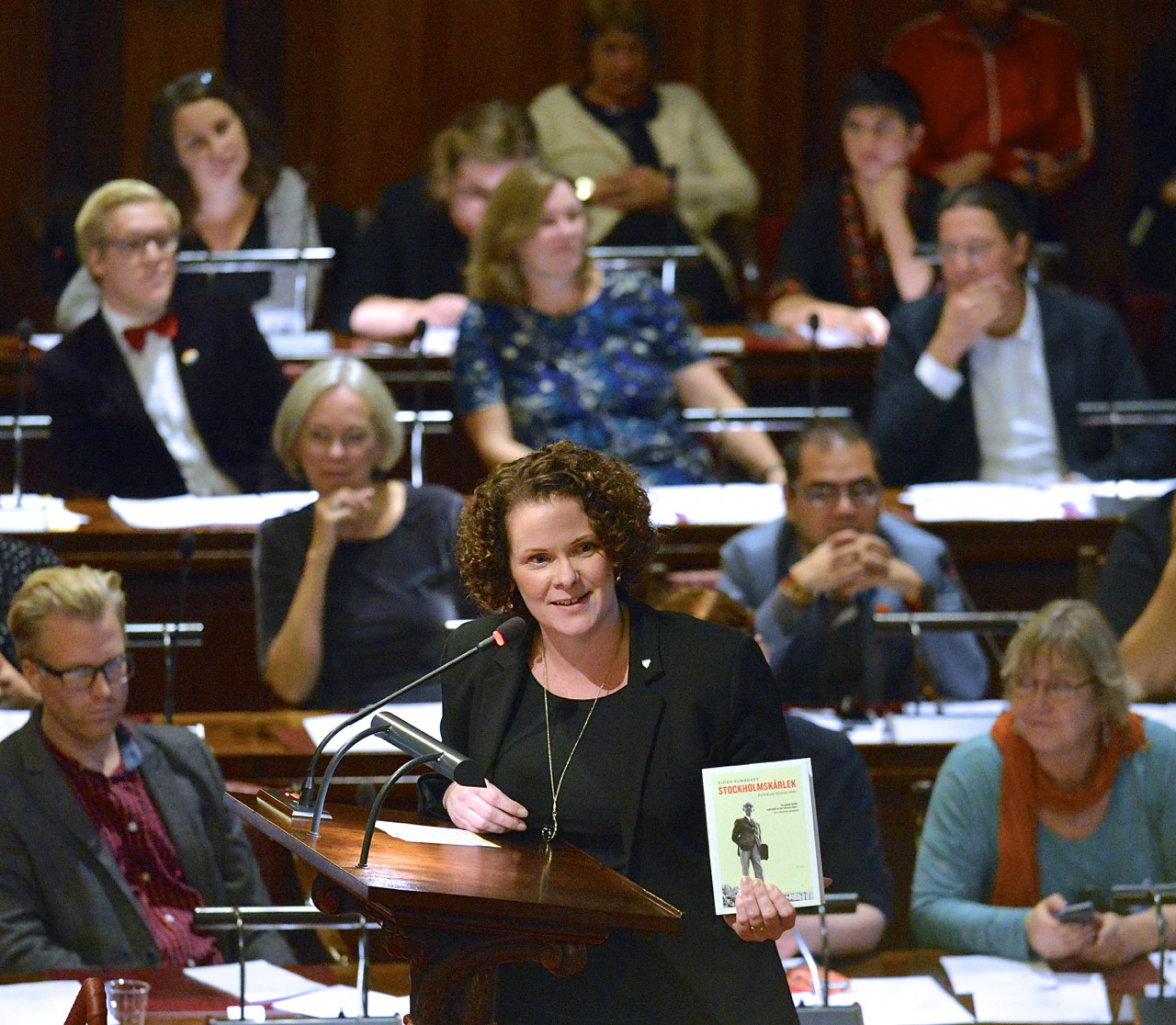 Karin Wanngård avtackar sin föregångare Sten Nordin i Stockholms Kommunfullmäktige den 20 oktober 2014.